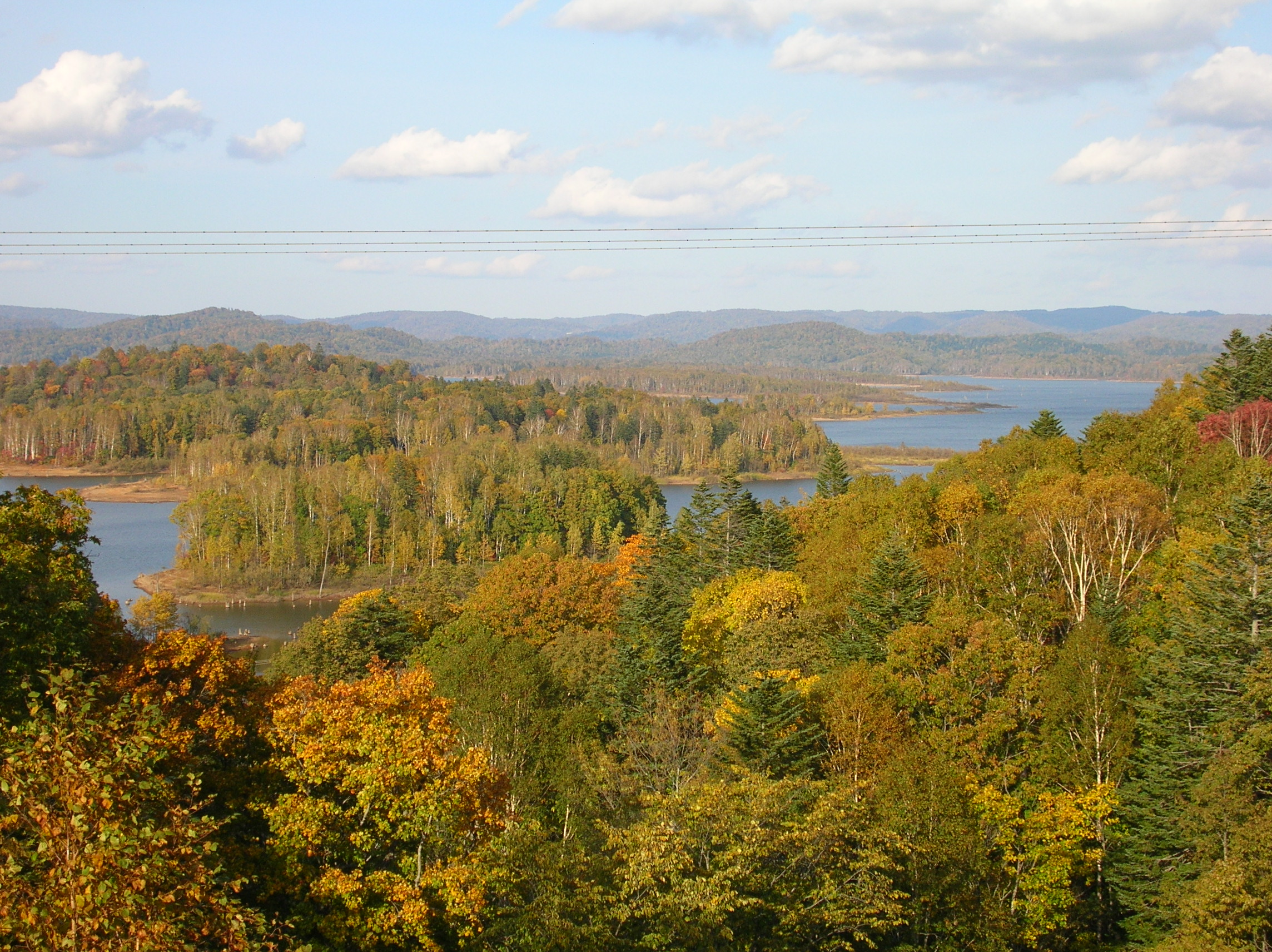 朱鞠内湖 展望台